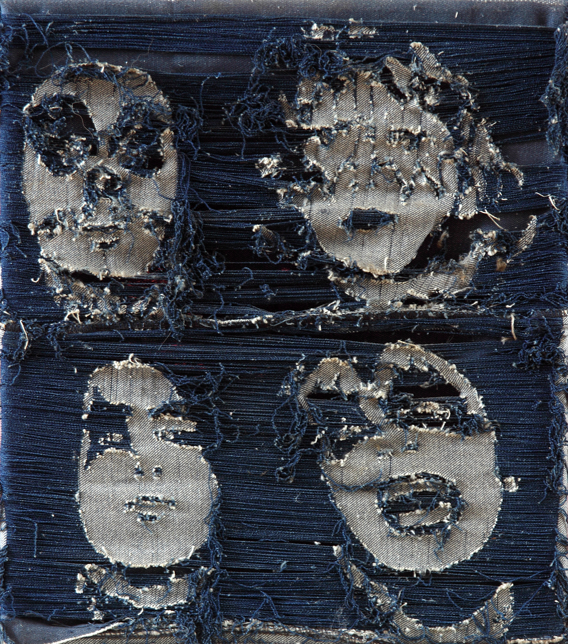 František Matoušek, Kissáci, páraná riflovina, 50 X 40 cm (1997)